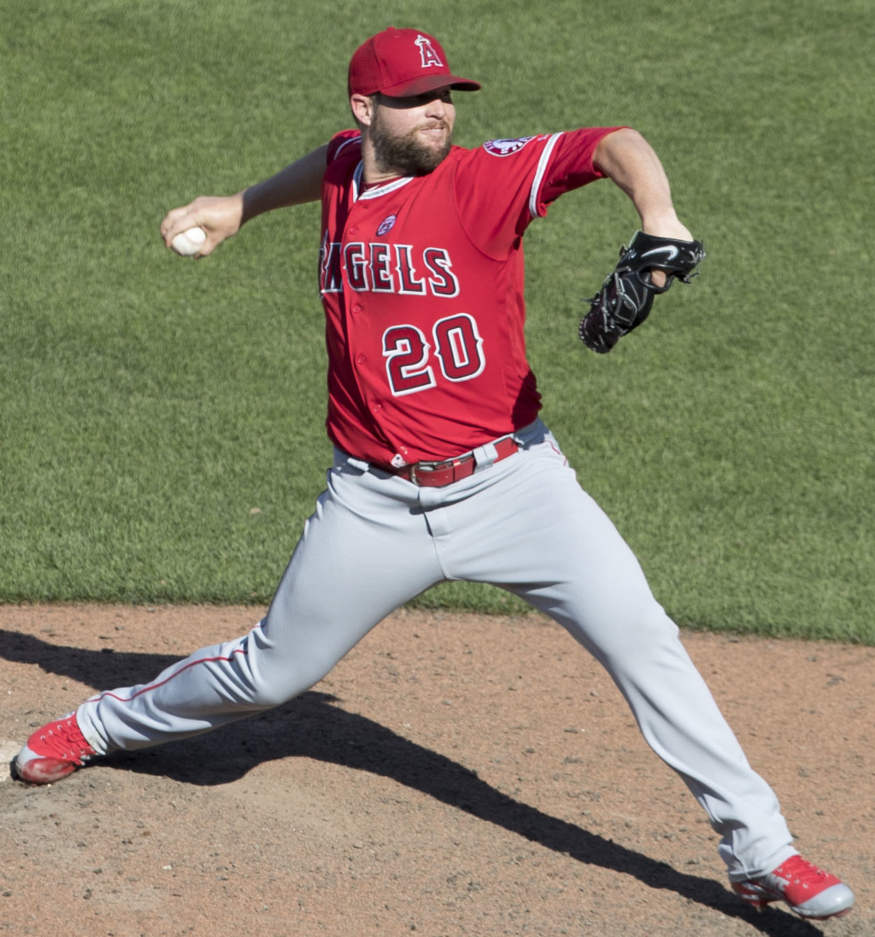 Angels at Orioles 8/20/17